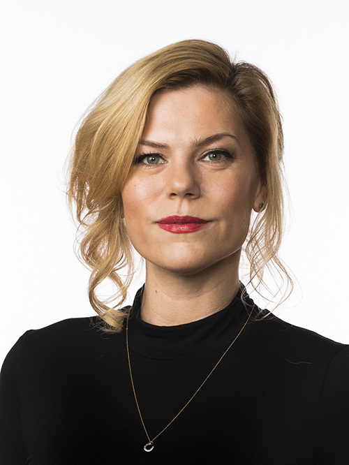 Jette F. Christensen, Arbeiderpartiet, Hordaland, utenriks- og forsvarskomiteen